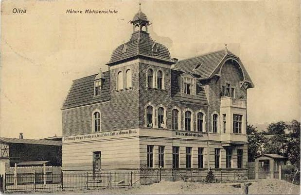 Gdańsk-Oliwa. W budynku tym mieścił się ratusz miasta Oliwa. Obecnie budynek nie istnieje.